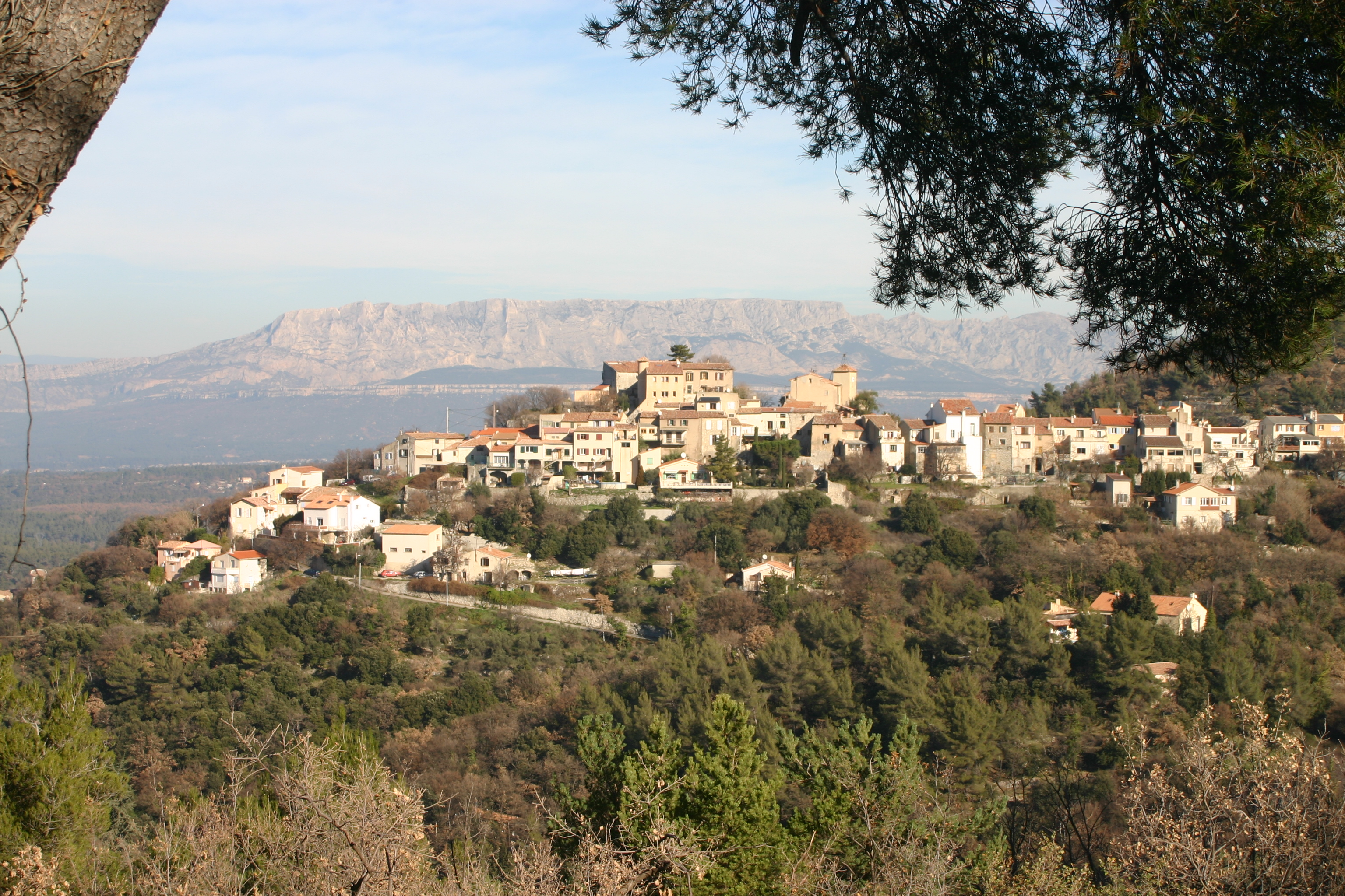 le village de Mimet